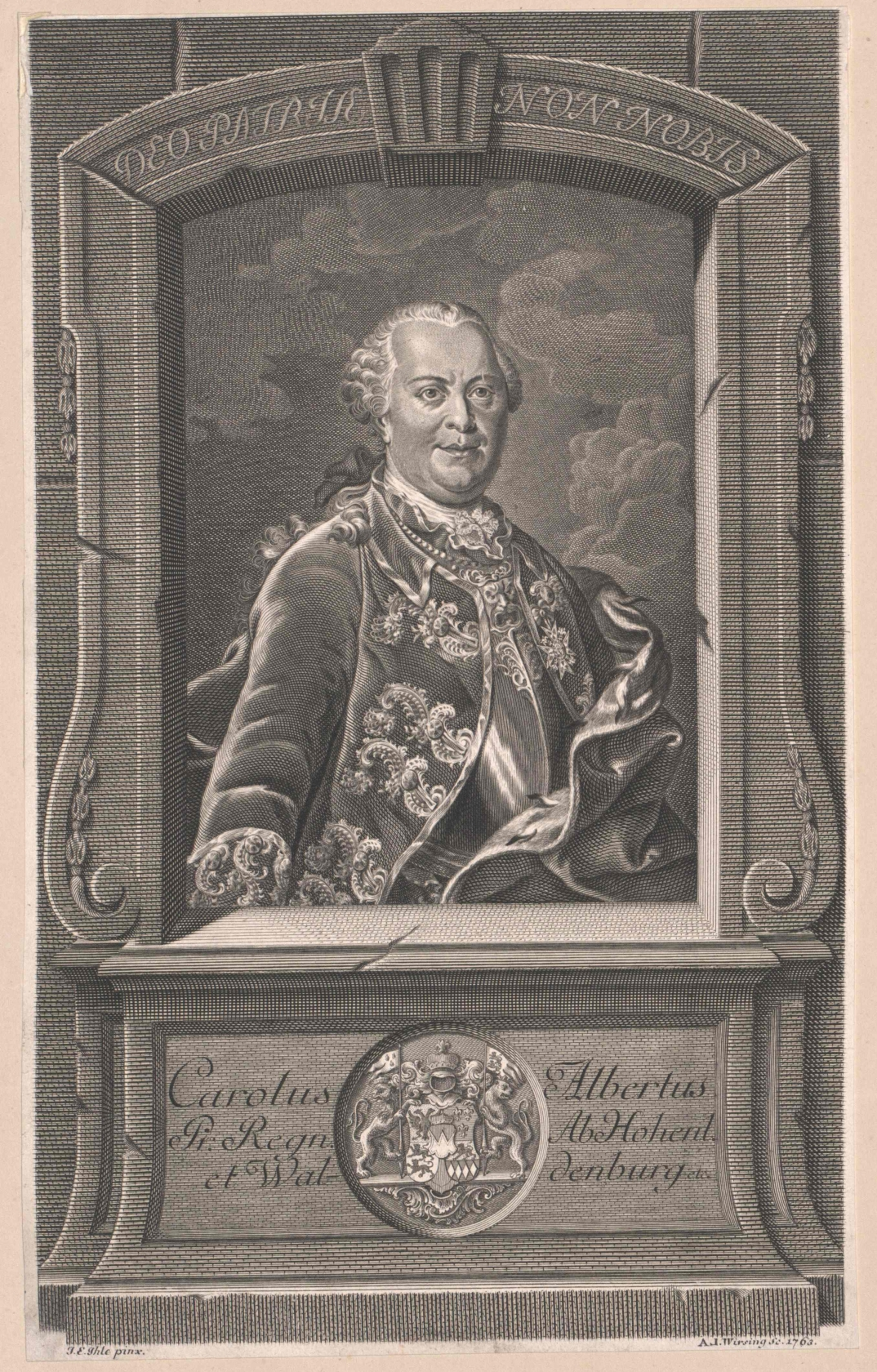 Karl Albrecht II. Fürst zu Hohenlohe-Waldenburg-Schillingsfürst, (1742 - 1796) Feldherr, Krieg, Militär, Porträt